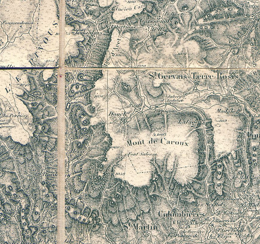 Description: Extrait de la Carte d'État-Major de 1866 (Secteur de Bédarieux, Hérault, France) Carte originale scannée Source: Hugo SoriaLicence: GFDL Hugo Soria